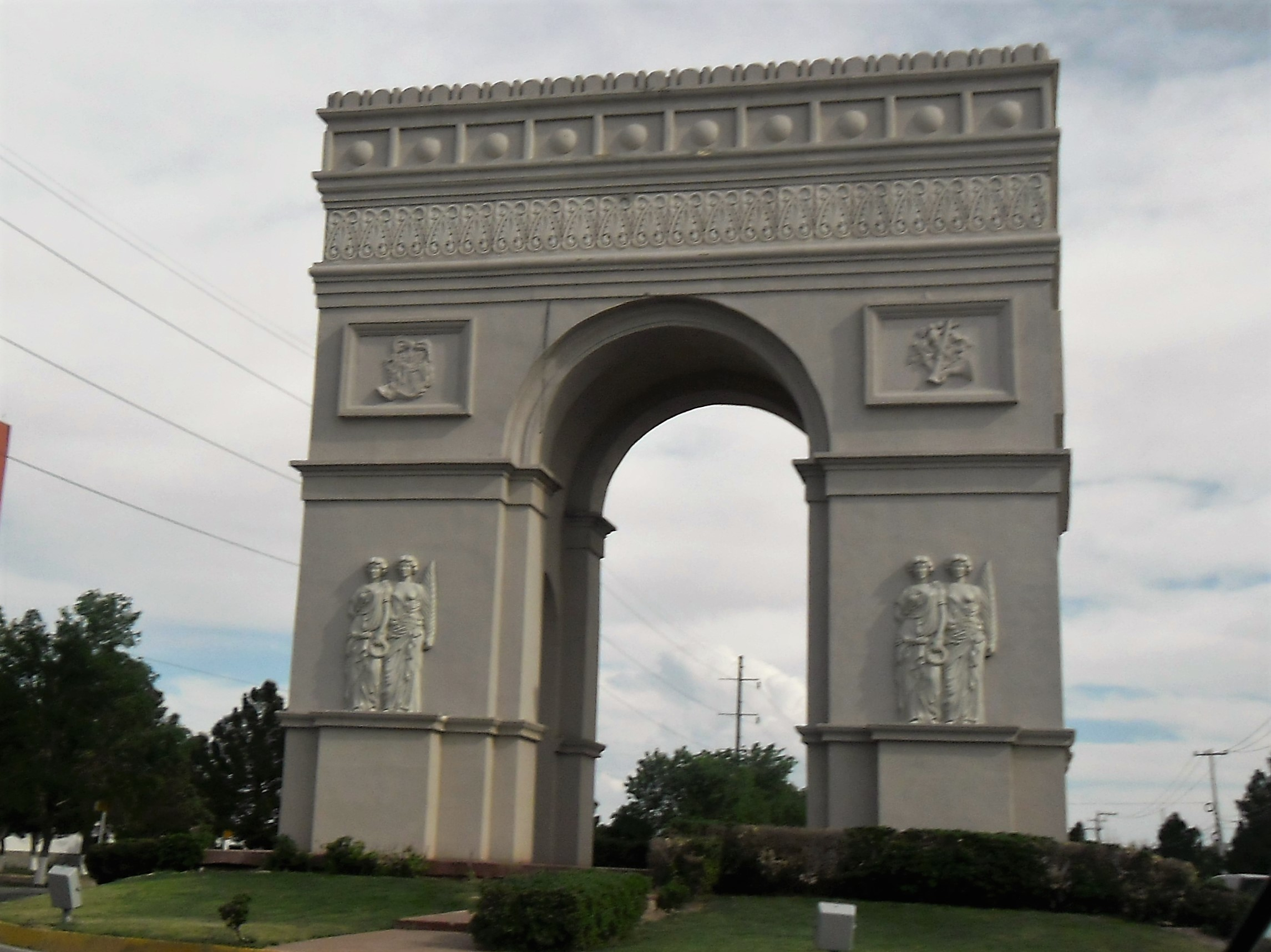 arco del triunfo